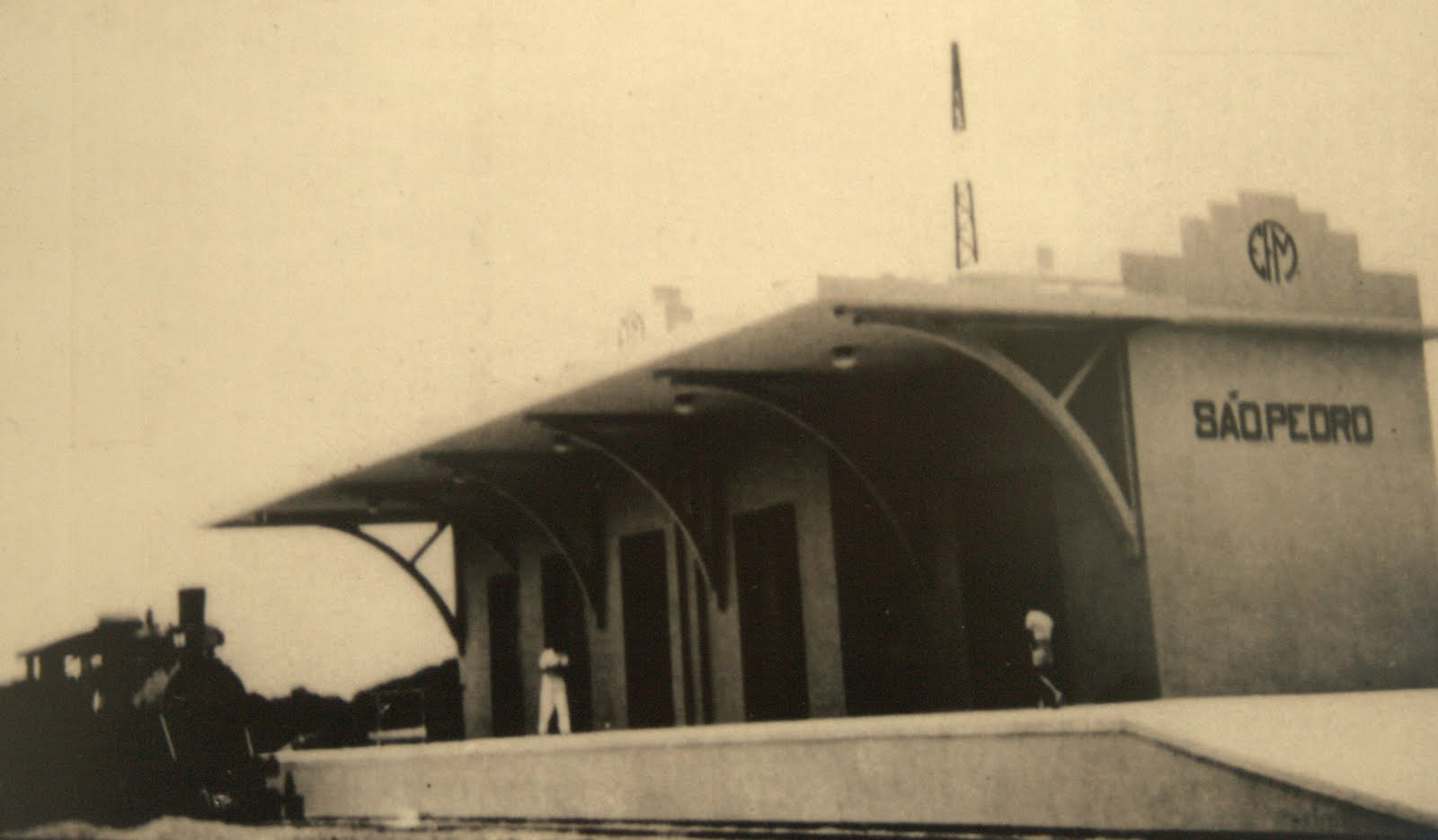 Foto histórica da Estação ferroviária de São Pedro da Aldeia